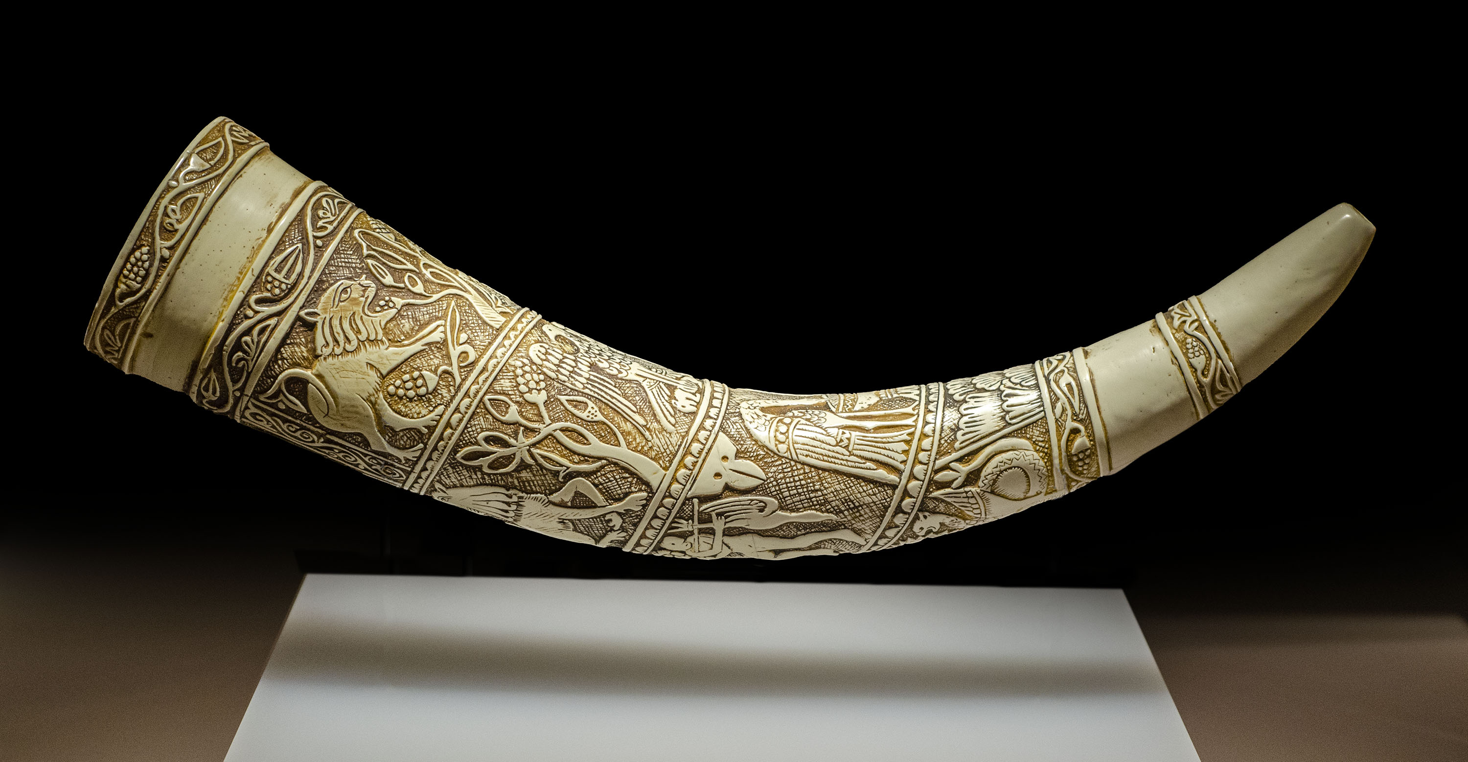 Instrumento de viento tallado en un colmillo de elefante. Original en marfil, siglo XI. Museo Diocesano de Zaragoza.